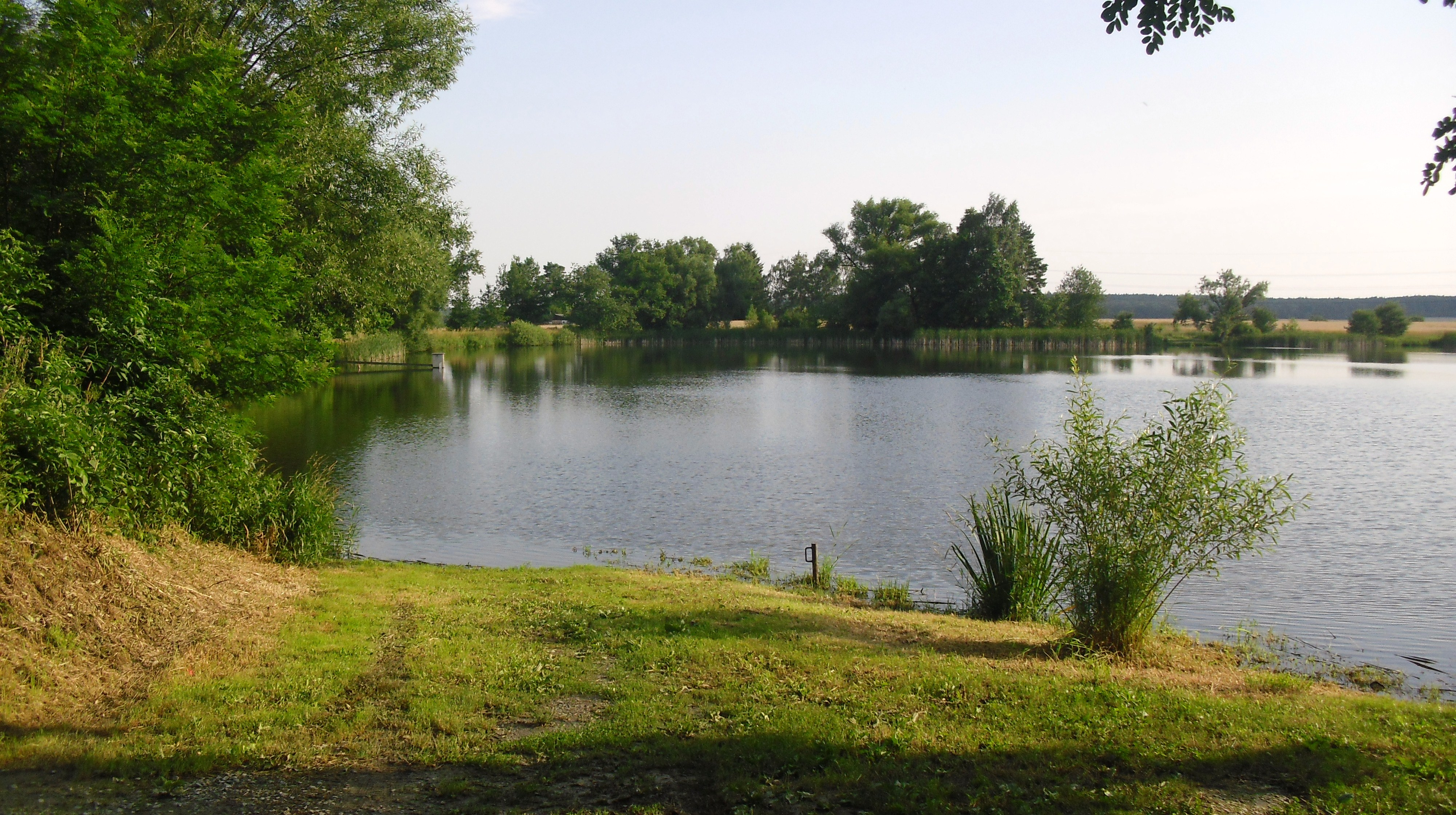 Drahotínský rybník